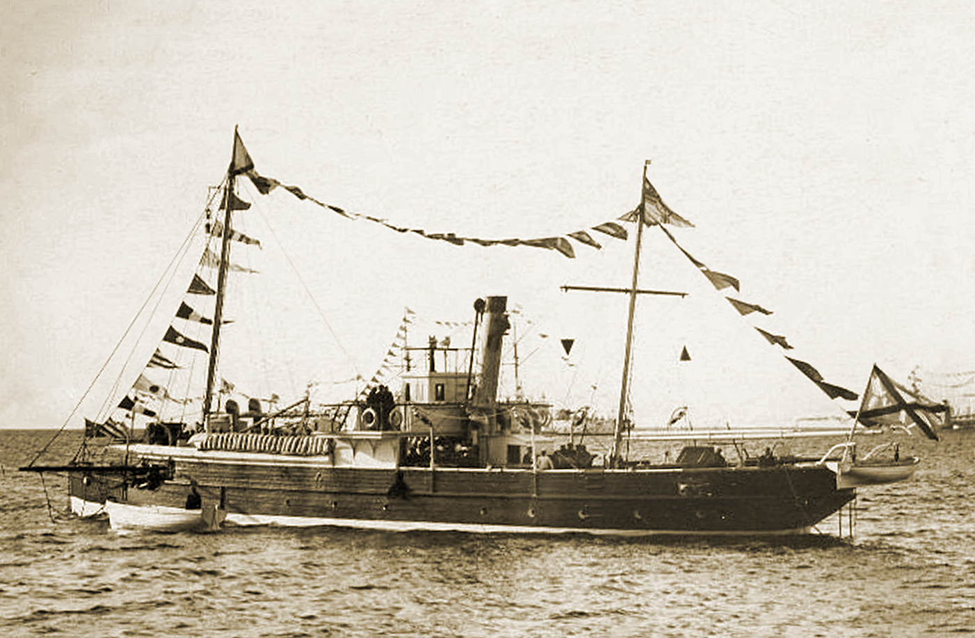 Канонерская лодка береговой обороны "Гроза" в праздничной расцветке